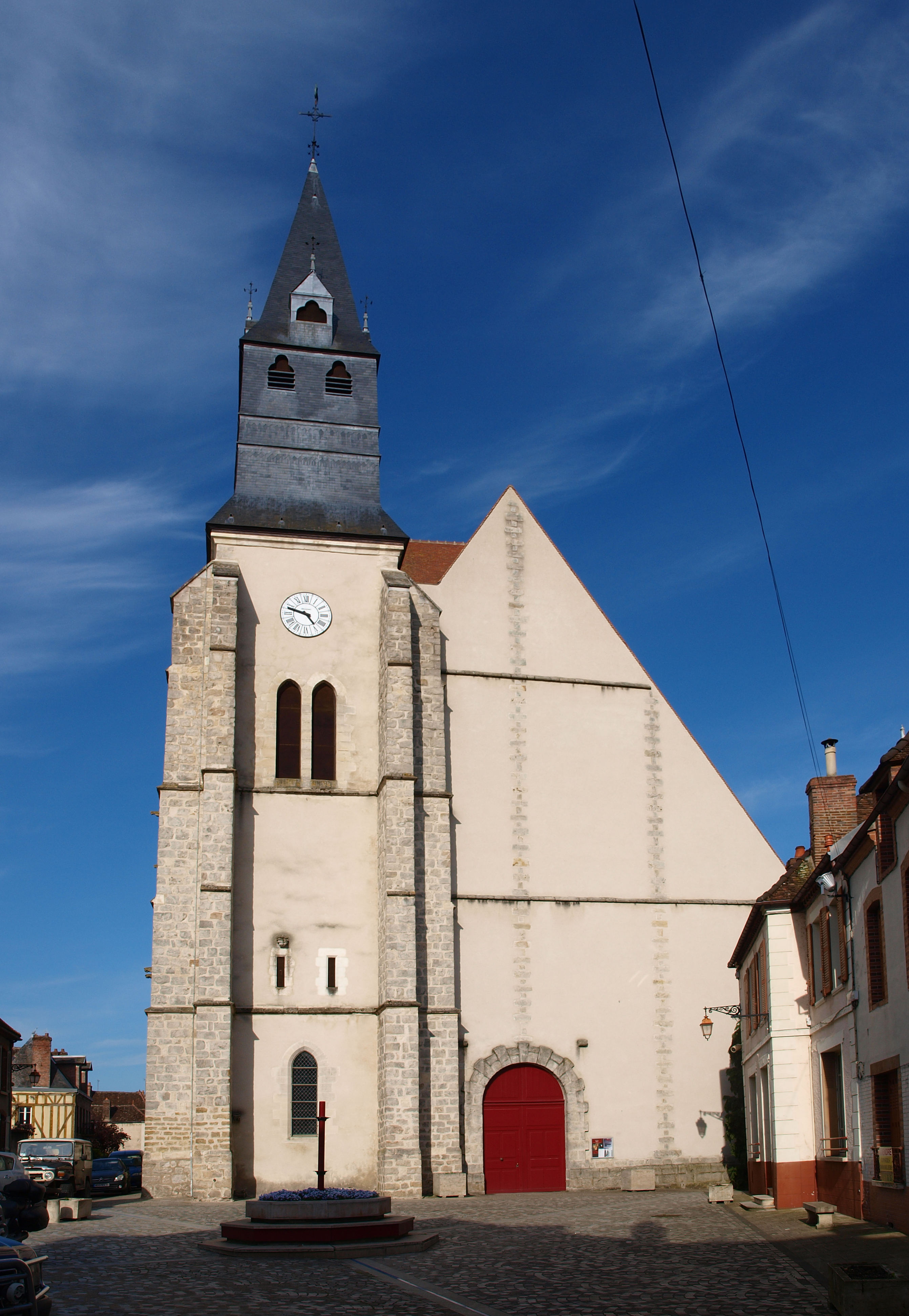 Saint-Julien-du-Sault (Yonne, France)